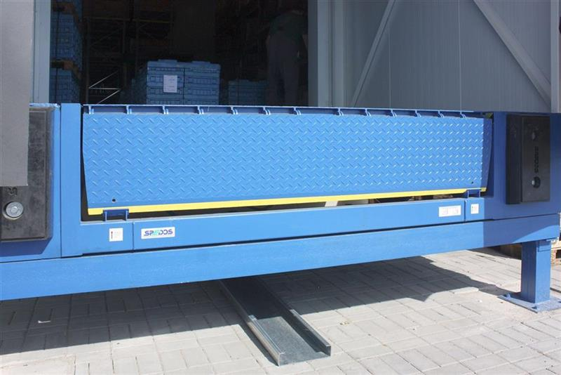 Aktuální vyobrazení nakládací rampy